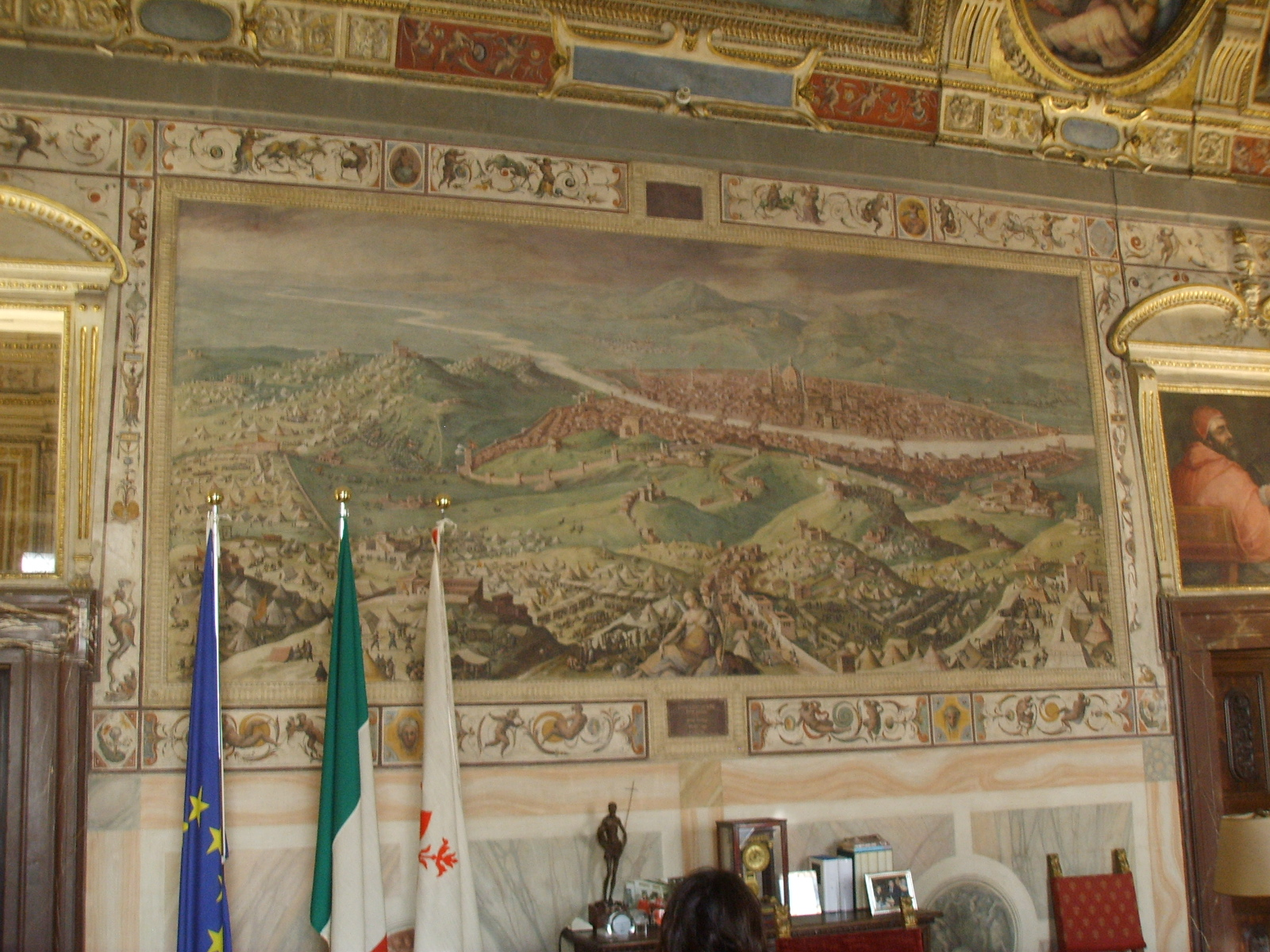 Sala di Clemente VII, stradano, assedio di Firenze